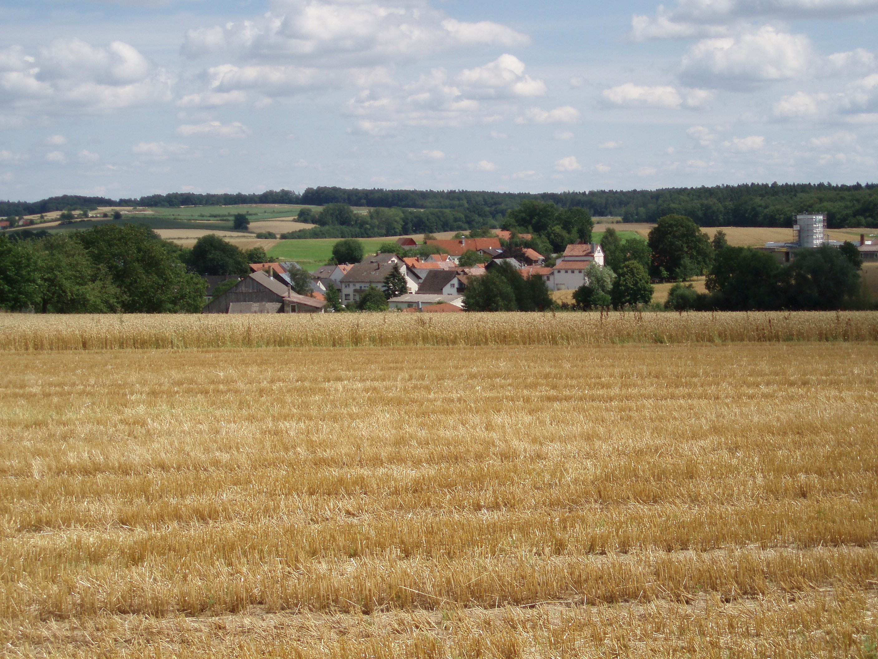 Birkach am Forst (Gemeinde Untersiemau, Oberfranken), Blick von Westen